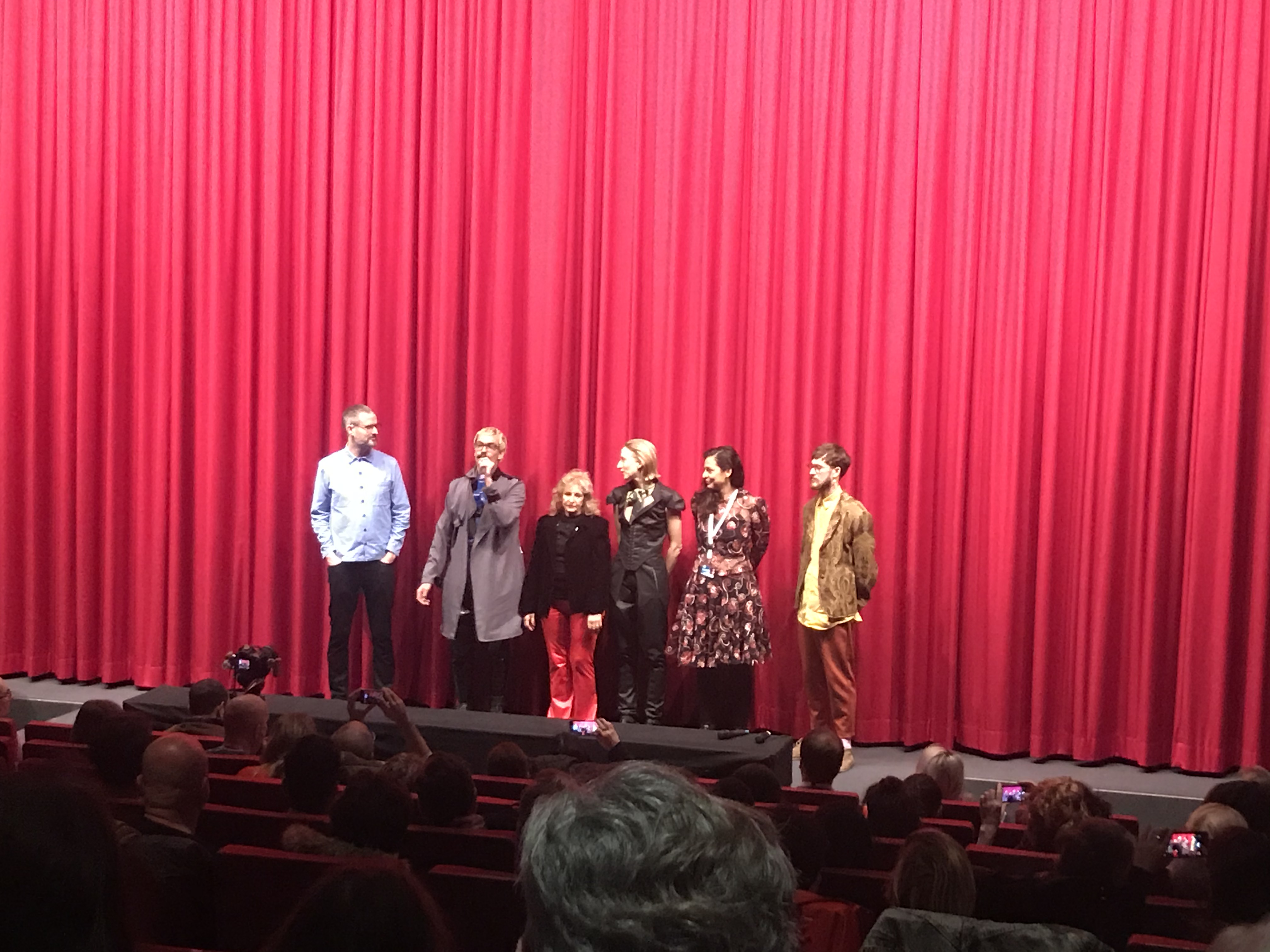 Weltpremiere Vil,má (engl. Divinely Evil) bei der Berlinale 2020 im Arsenal 1, Crew beim Publikumsgespräch